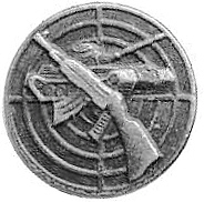 korpusówka wojsk zmechanizowanych Wojska Polskiego (grafika dostarczona przez Kwz)